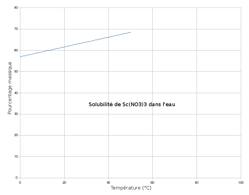 Solubilité de Sc(NO3)3 dans l'eau en fonction de la température.